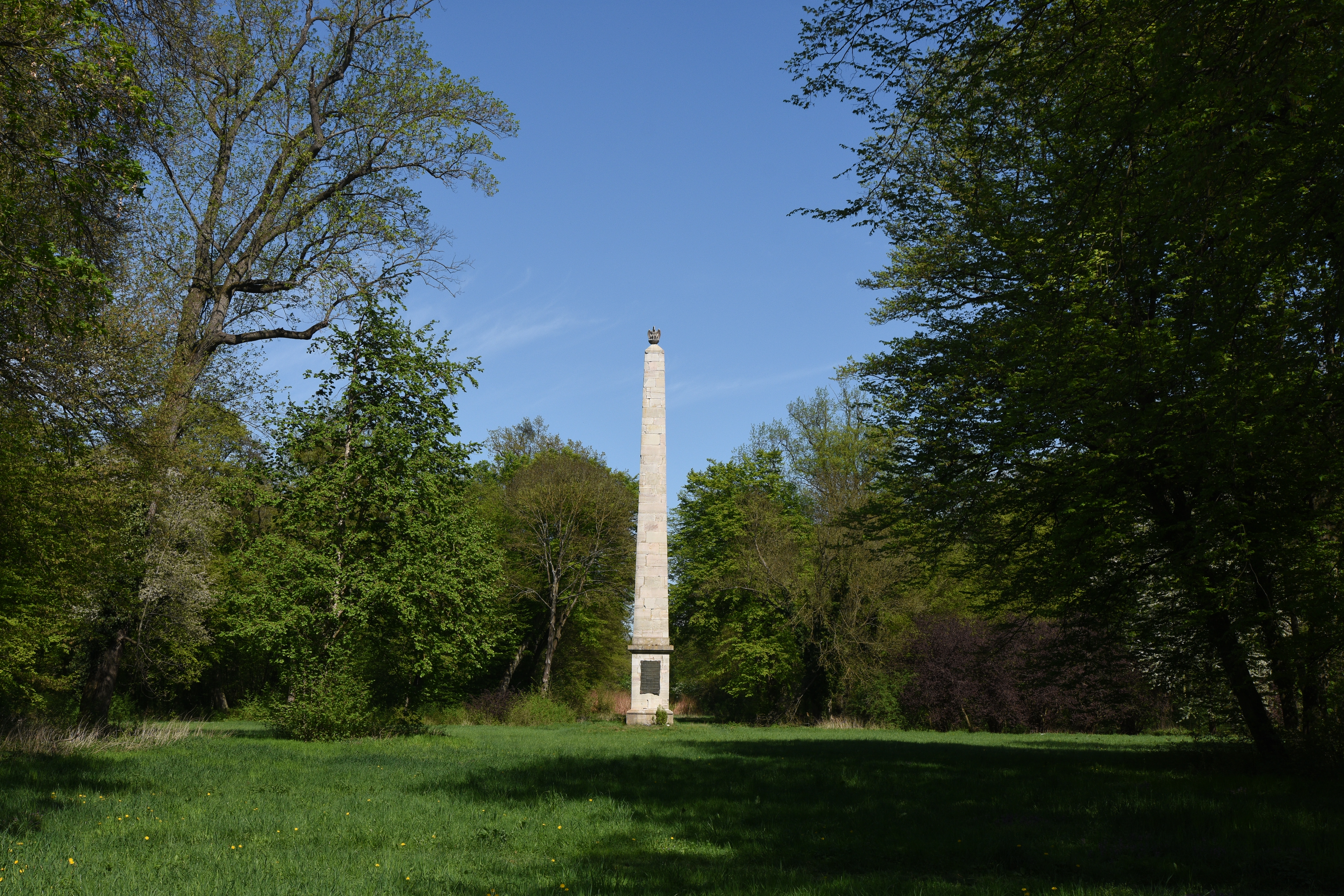 Körmendi Kastélypark Természetvédelmi terület